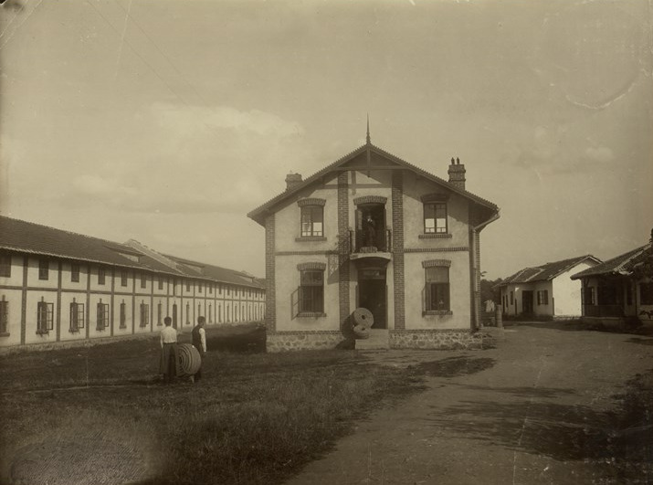 Първа българска въжарска фабрика на Цоньо Паяков и Иван Въжаров в София. Основана в 1902 г. с основен капитал 50 000 лева, с 15 работници. През 1912 г. е с основен капитал 200 000 лева и 150 работници. Фотоалбум с фотографии на български индустриални предприятия от периода 1887-1912 г., подарен от Съюза на българските индустриалци на цар Фердинанд І по случай 25-годишнината от възшествието му на българския престол.